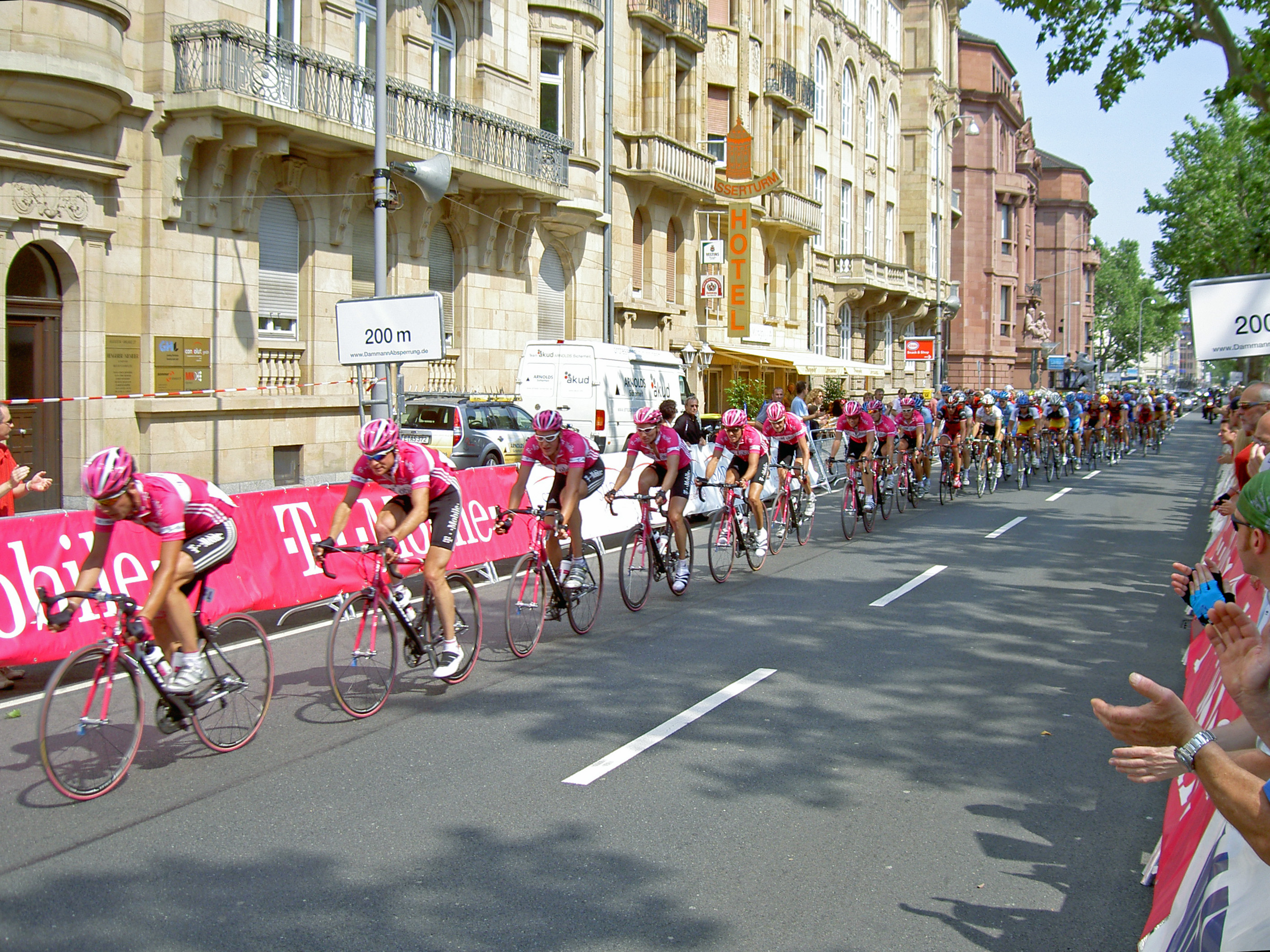 Germany, Mannheim, Deutsche Meisterschaft im Einer-Straßenfahren, T-Mobile Team